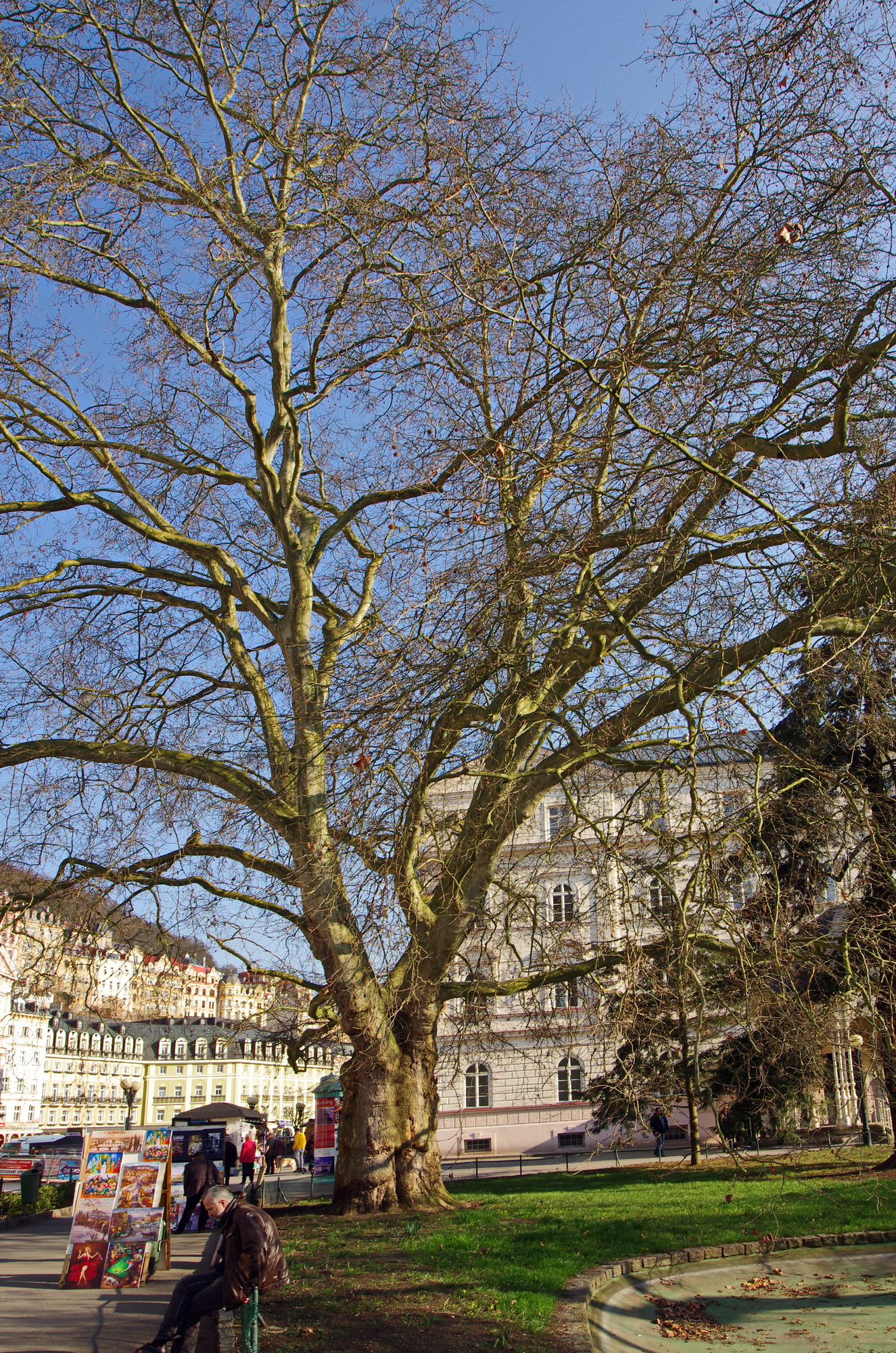 památný strom Dvořákův platan v Dvořákových sadech v Karlových Varech